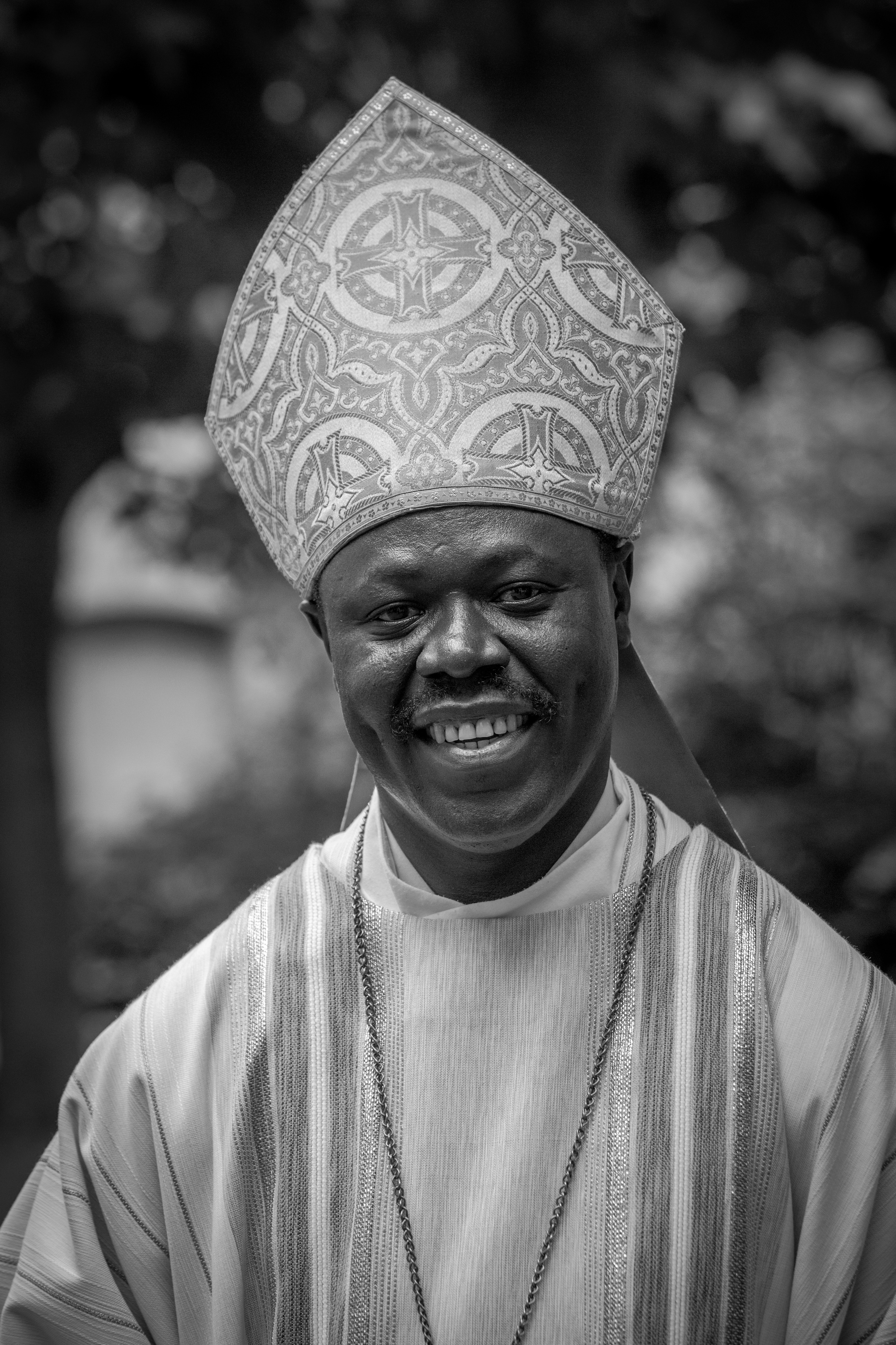 Mgr Nestor-Désiré Nongo-Aziagbia, né le 6 mars 1970 à Mbaiki, est évêque de Bossangoa en République centrafricaine.